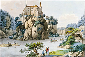 Beschreibung: Burg Orlík nad Vltavou, historische Ansicht; Lizenzstatus: GNU-FDL Kategorie:Bild:Burg